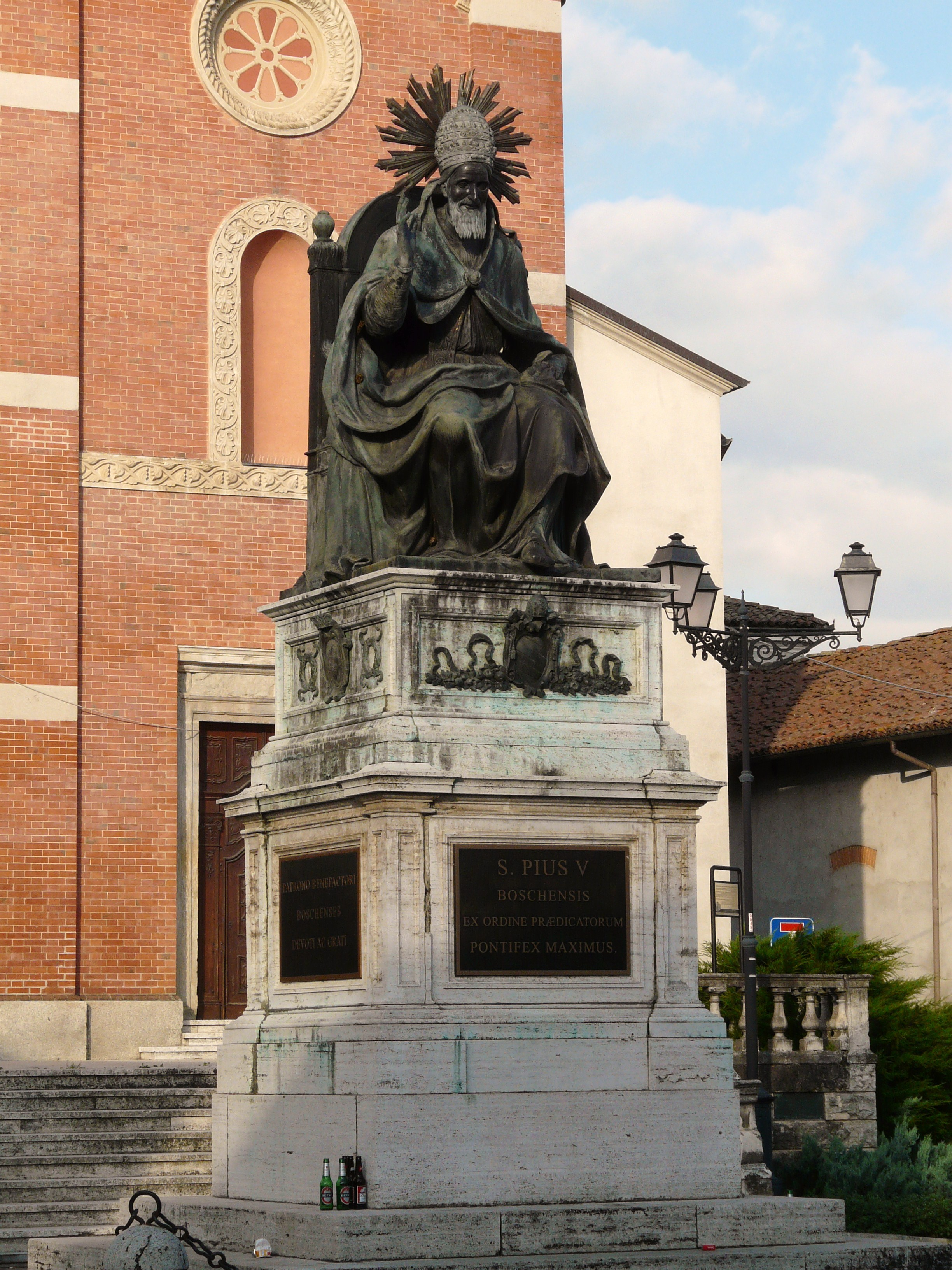 Monumento bronzeo (1936) al pontefice S. Pio V nella piazza antistante la chiesa dei Santi Pietro e Pantaleone, Bosco Marengo, Piemonte, Italia